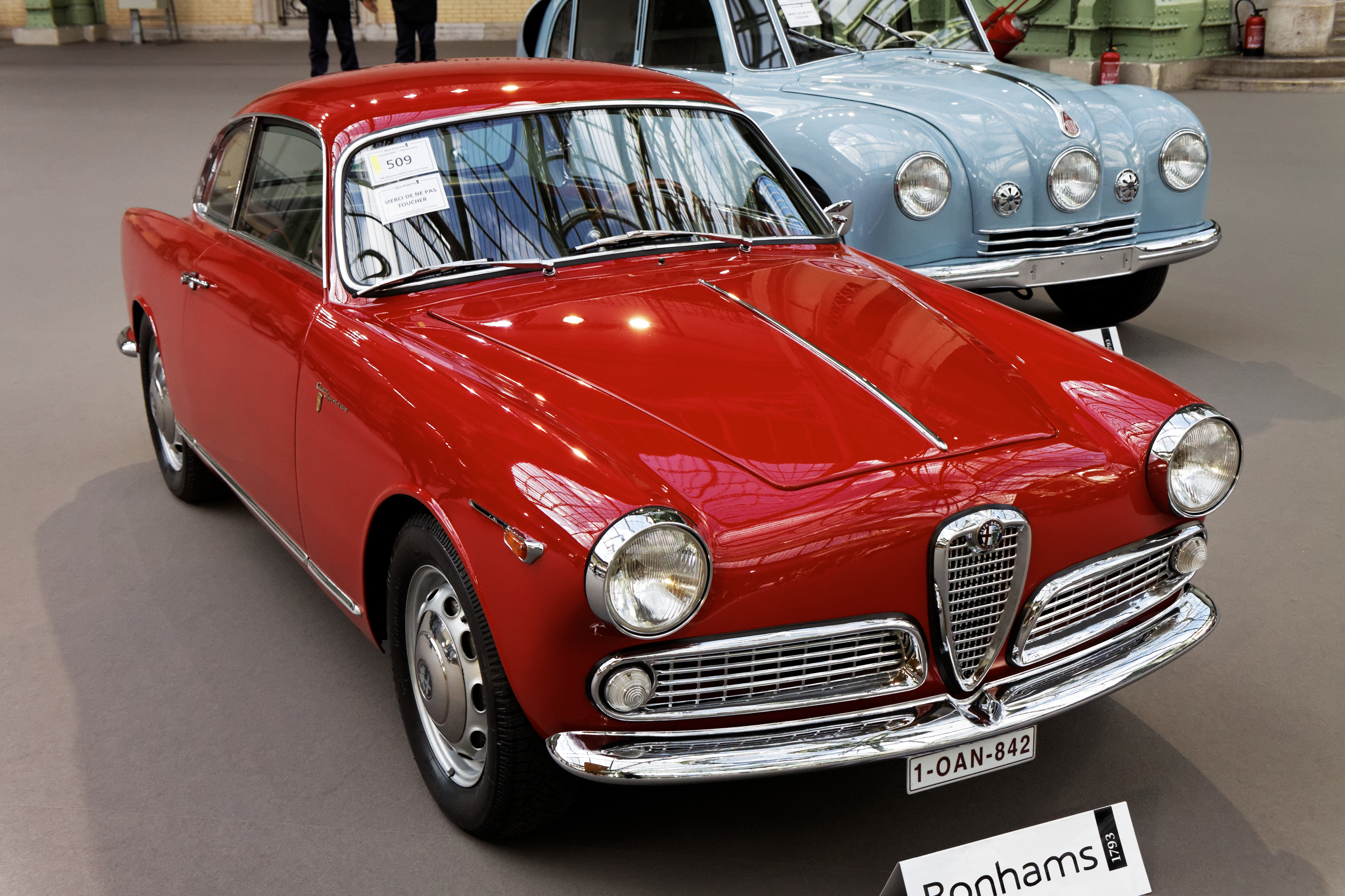 Une Alfa Romeo Giulietta Coupé Sprint Veloce de 1958.